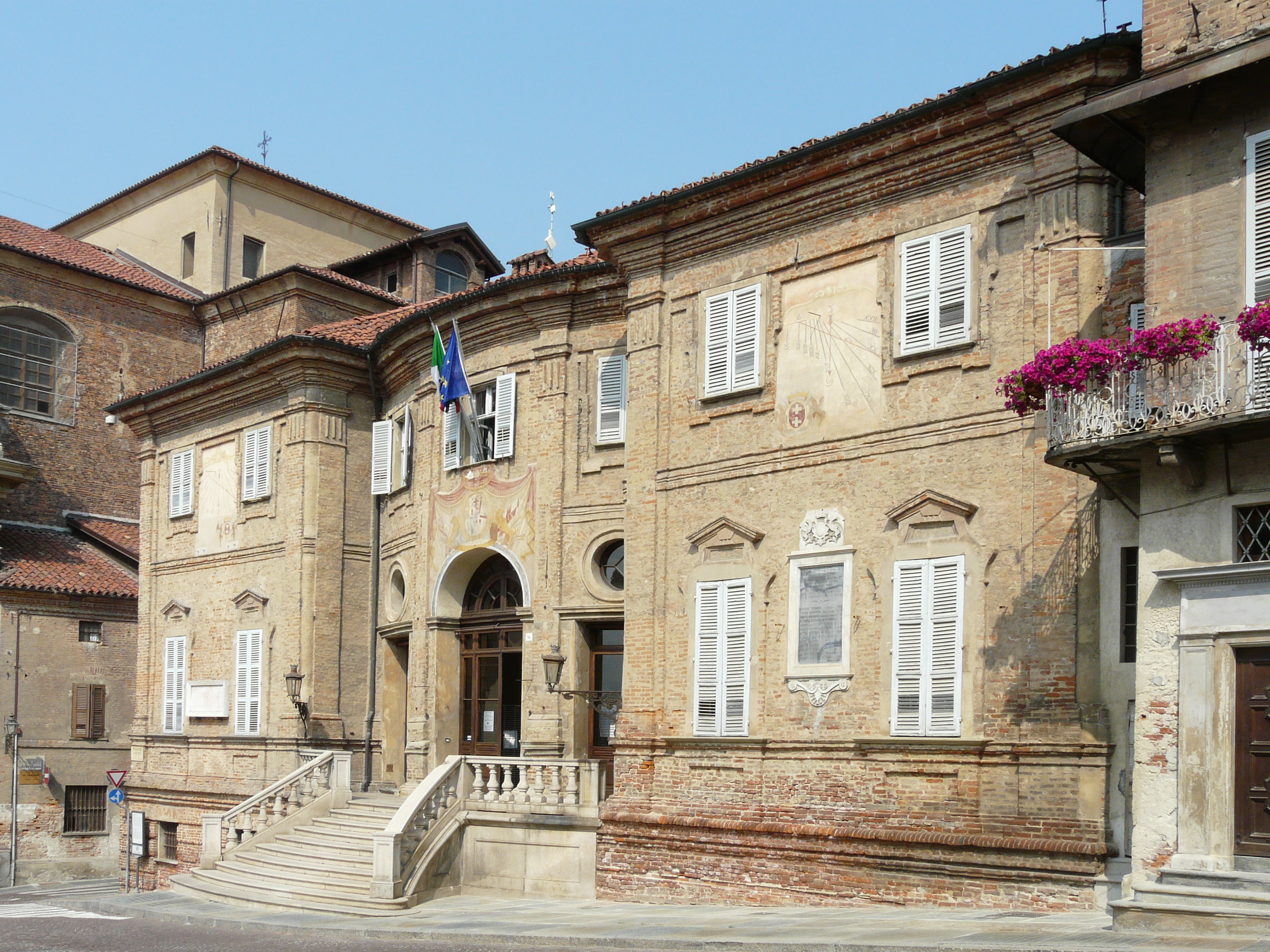 Municipio di Bra, Piemonte, Italia